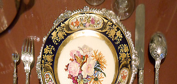 Cr Brussel